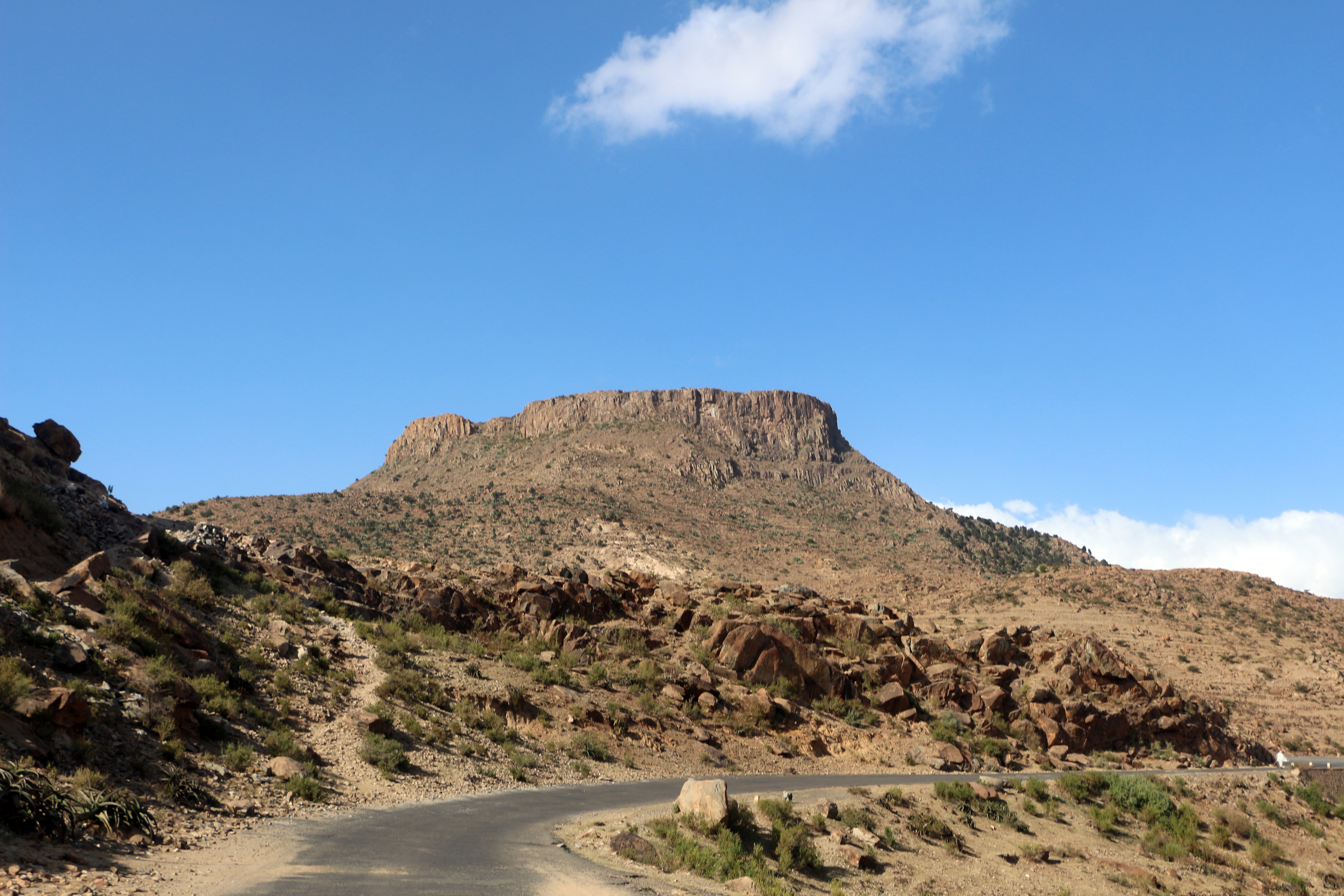 Massiccio sulla strada tra adi keyh e segheneyti.JPG